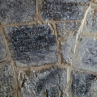 Армянские надписи близ крепости, в пещерном некрополе 5-6 века